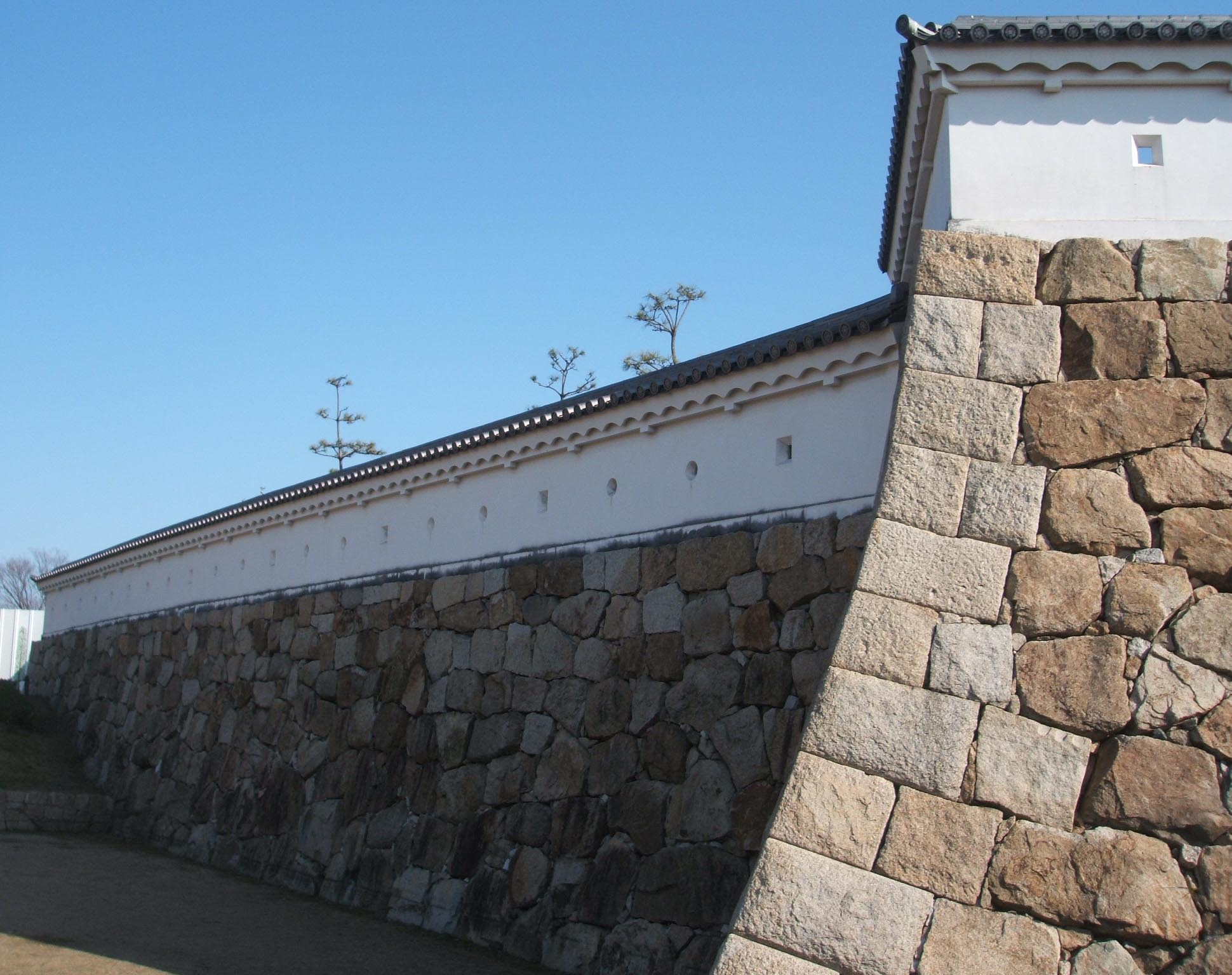 尼崎城（復興復元）